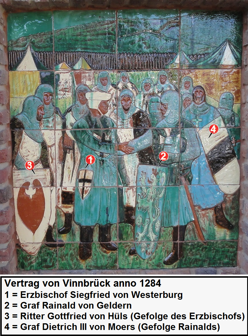 Vertrag von Vinnbrueck 1284 - die Vertragspartner